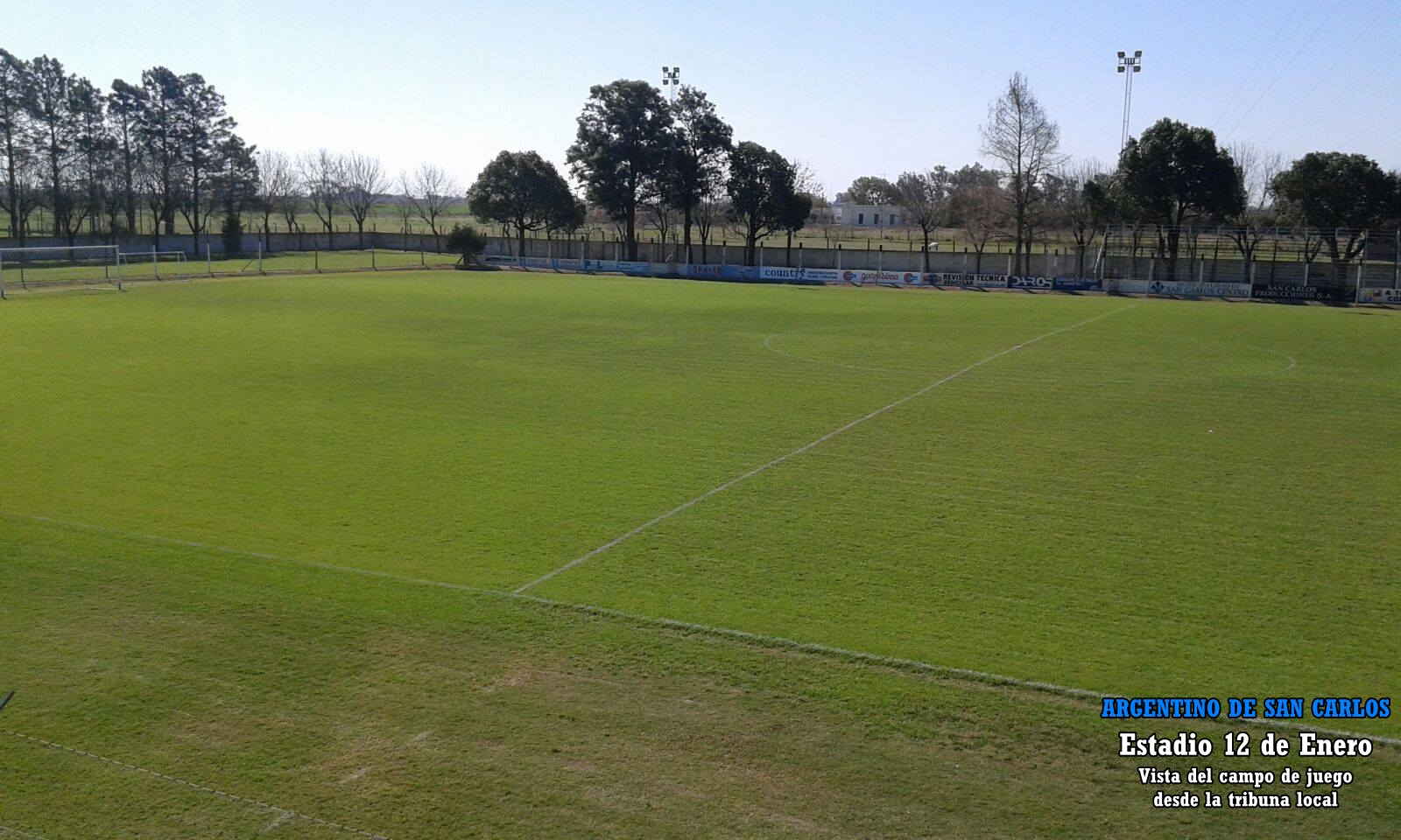 Estadio 12 de Enero - Vista del campo de juego desde la tribuna local